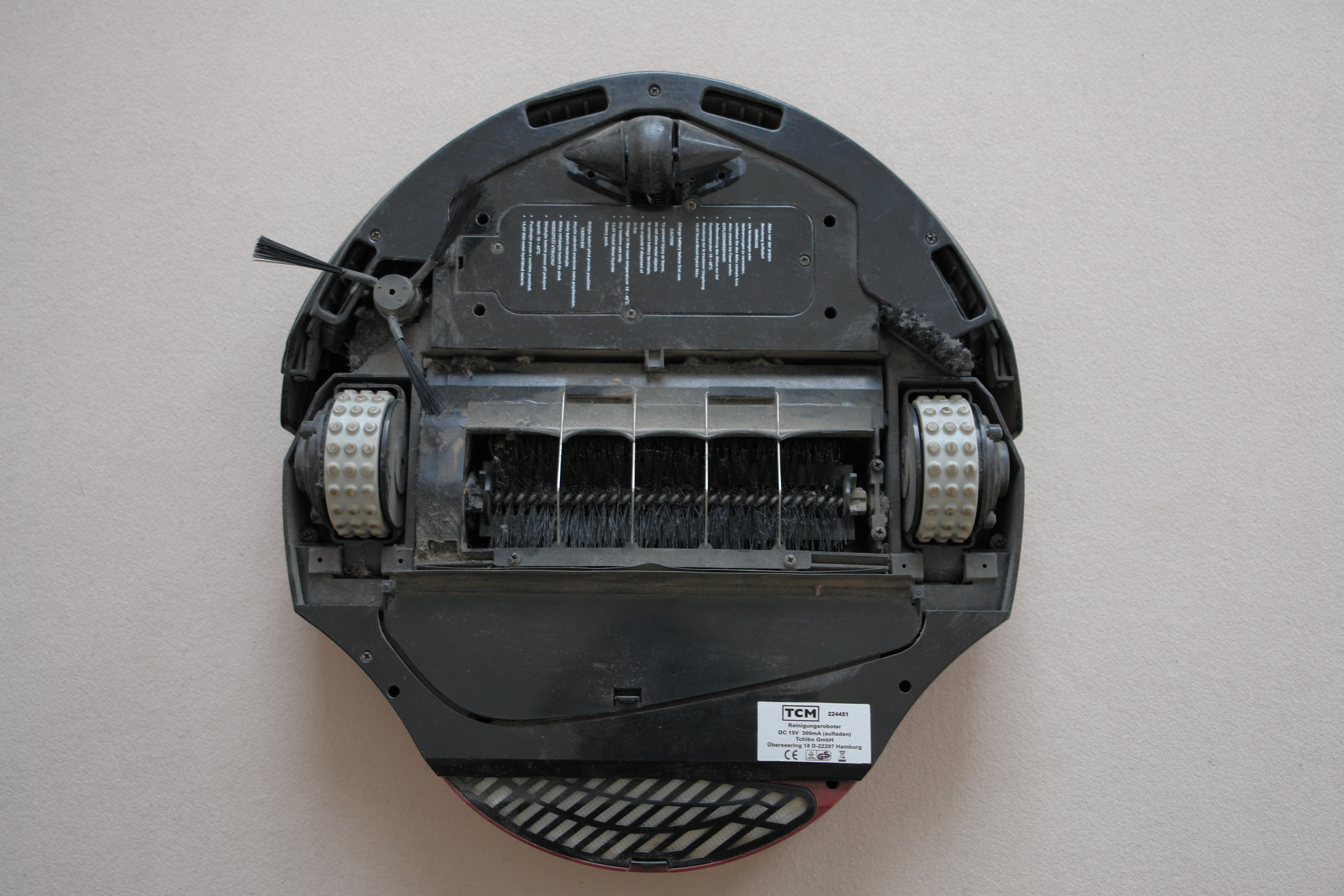 Reinigungsroboter der Marke TCM.